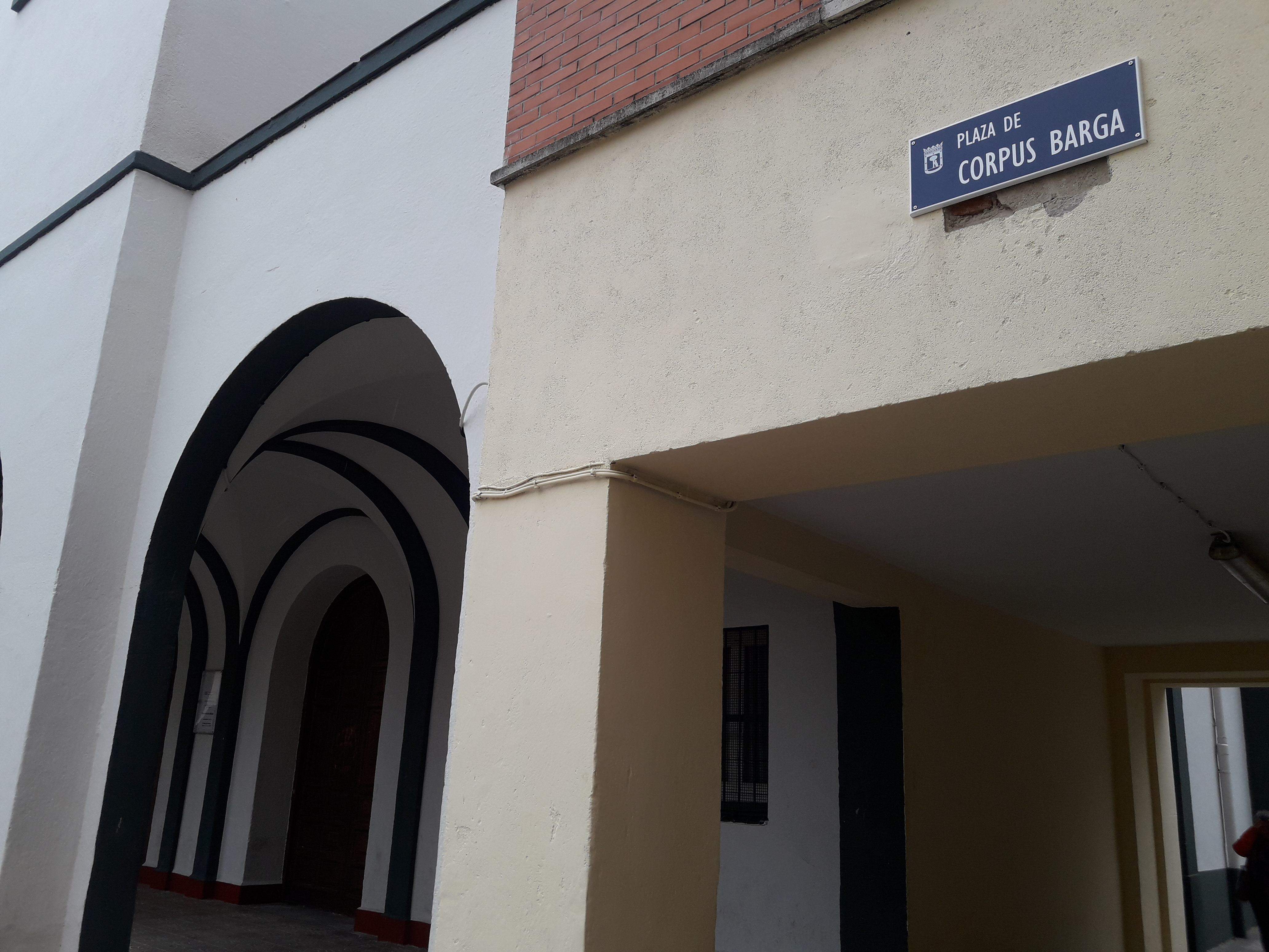 Con las recomendaciones realizadas por el Comisionado de la Memoria Histórica, el Pleno del Ayuntamiento de Madrid, en la sesión extraordinaria celebrada en abril de 2017, aprobó el cambio de denominación de calles, plazas y espacios públicos de la ciudad en las que se conmemoraba la sublevación militar, la Guerra Civil Española o la represión de la dictadura del General Franco. Tras el auto del Tribunal Superior de Justicia de Madrid, que desestimaba medidas cautelares contra este Acuerdo Plenario, el cambio de nombres en el callejero se ha hecho posible.